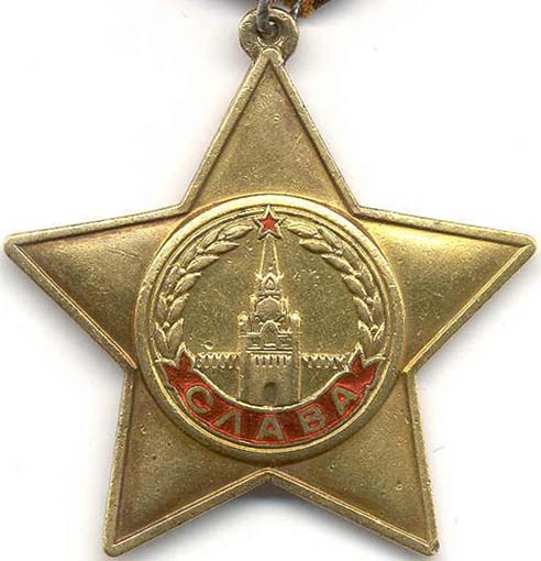 Звезда Ордена Славы 1 степени